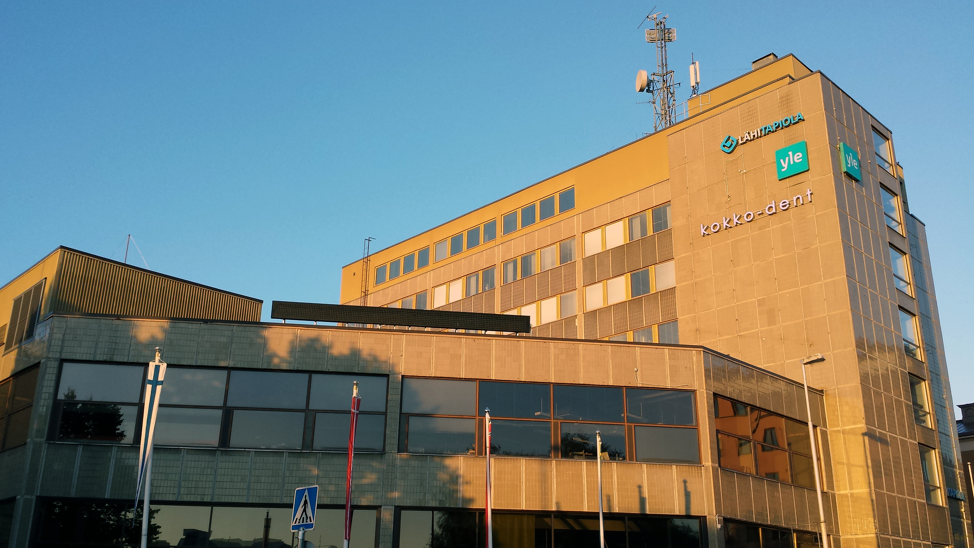 Radio Keski-Pohjanmaan toimitilat Kokkolassa, Suomessa.